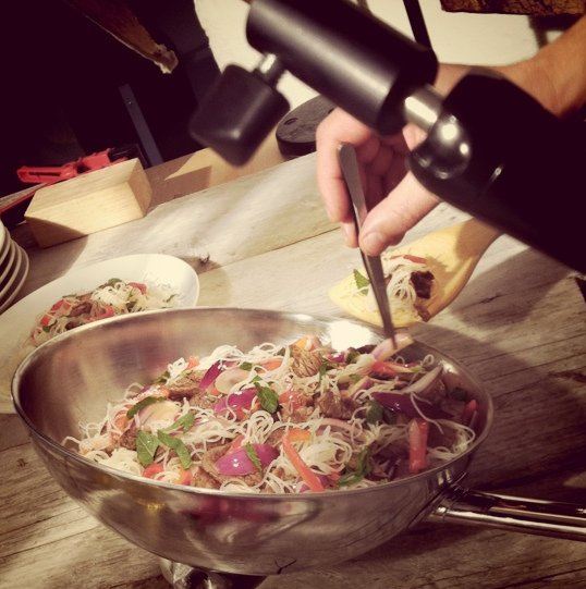 Food styling. Food photography. Fotografie jídla, produktová fotografie.